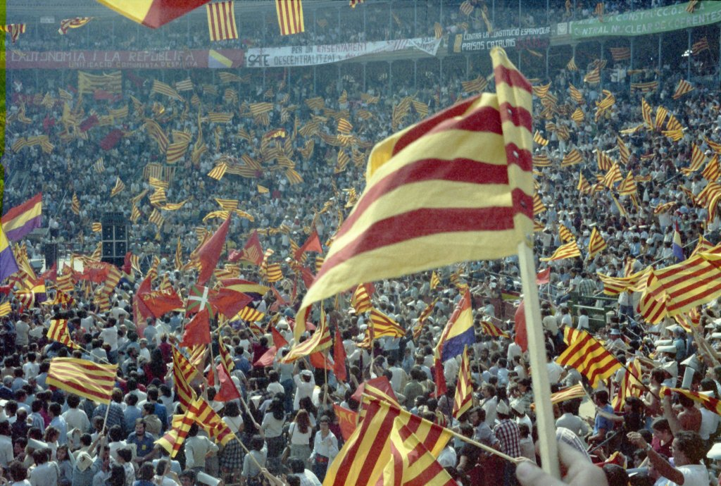 Vista de la banda dreta de Plaça de Bous de València durant l'acte realitzat en la XIX edició de l'Aplec del País Valencià. Fotografia: Vicent Soler Alba